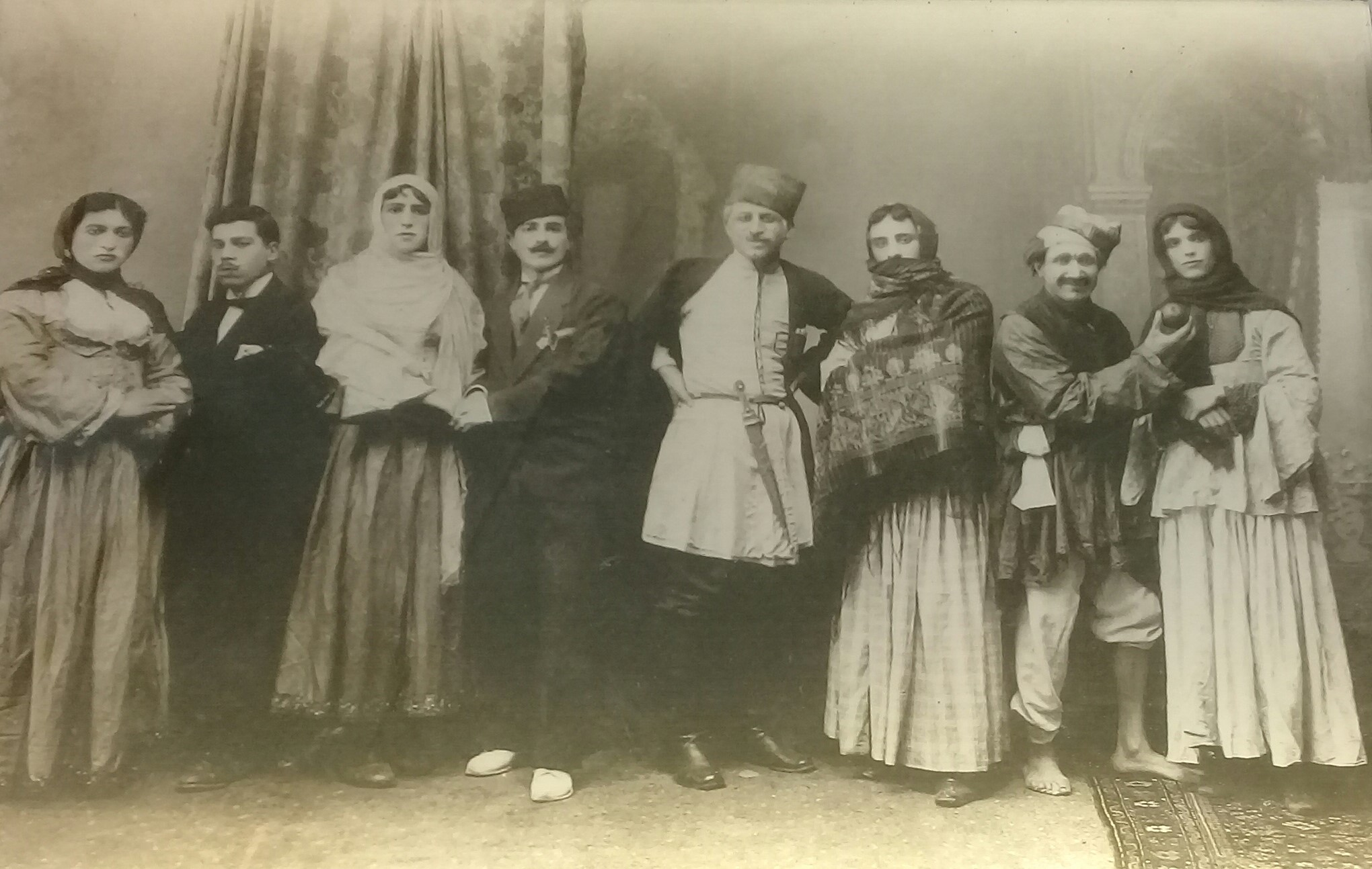 1917-ci ildə çəkilmiş "Arşın mal alan" filminin aktyor heyəti The cast of "Arshin mal alan" movie in 1917